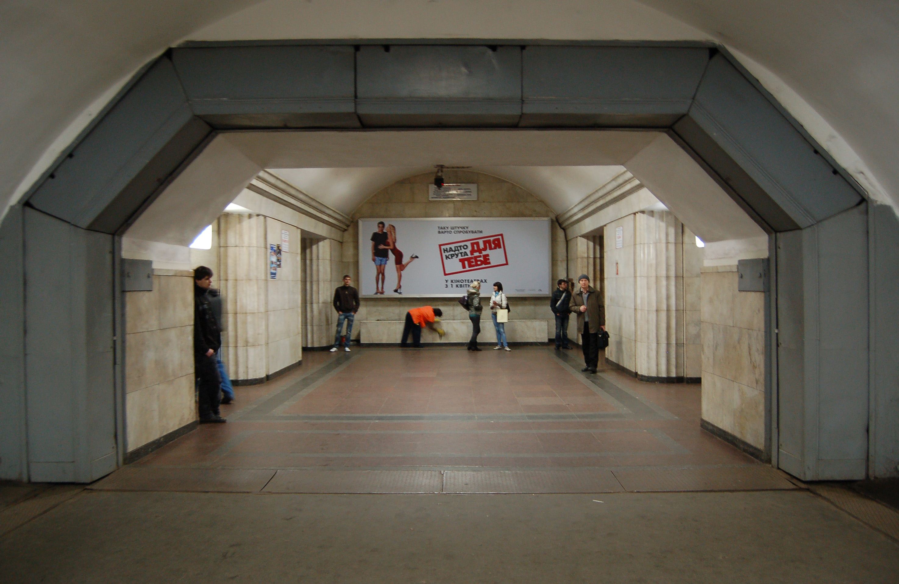 Станция метро «Арсенальная», центральный зал